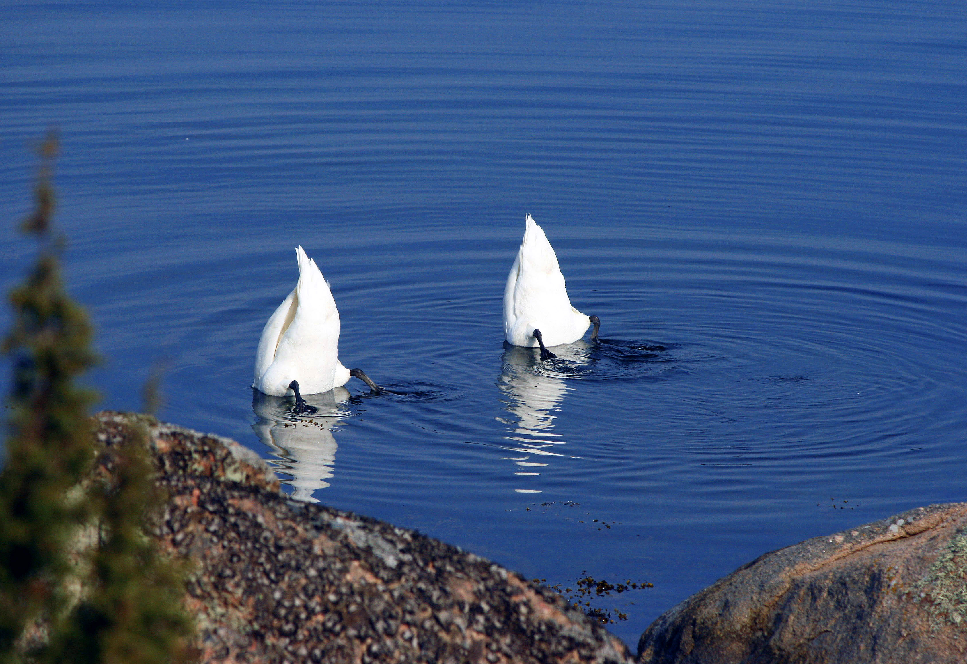 2 Knölsvanar